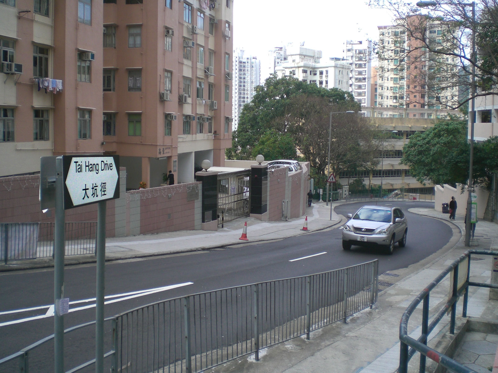 香港大坑，大坑徑